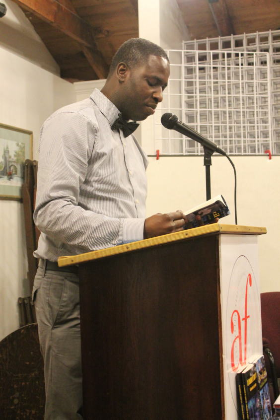 Fred Edson Lafortune à l'Alliance Française de Rhode Island en Février 2014